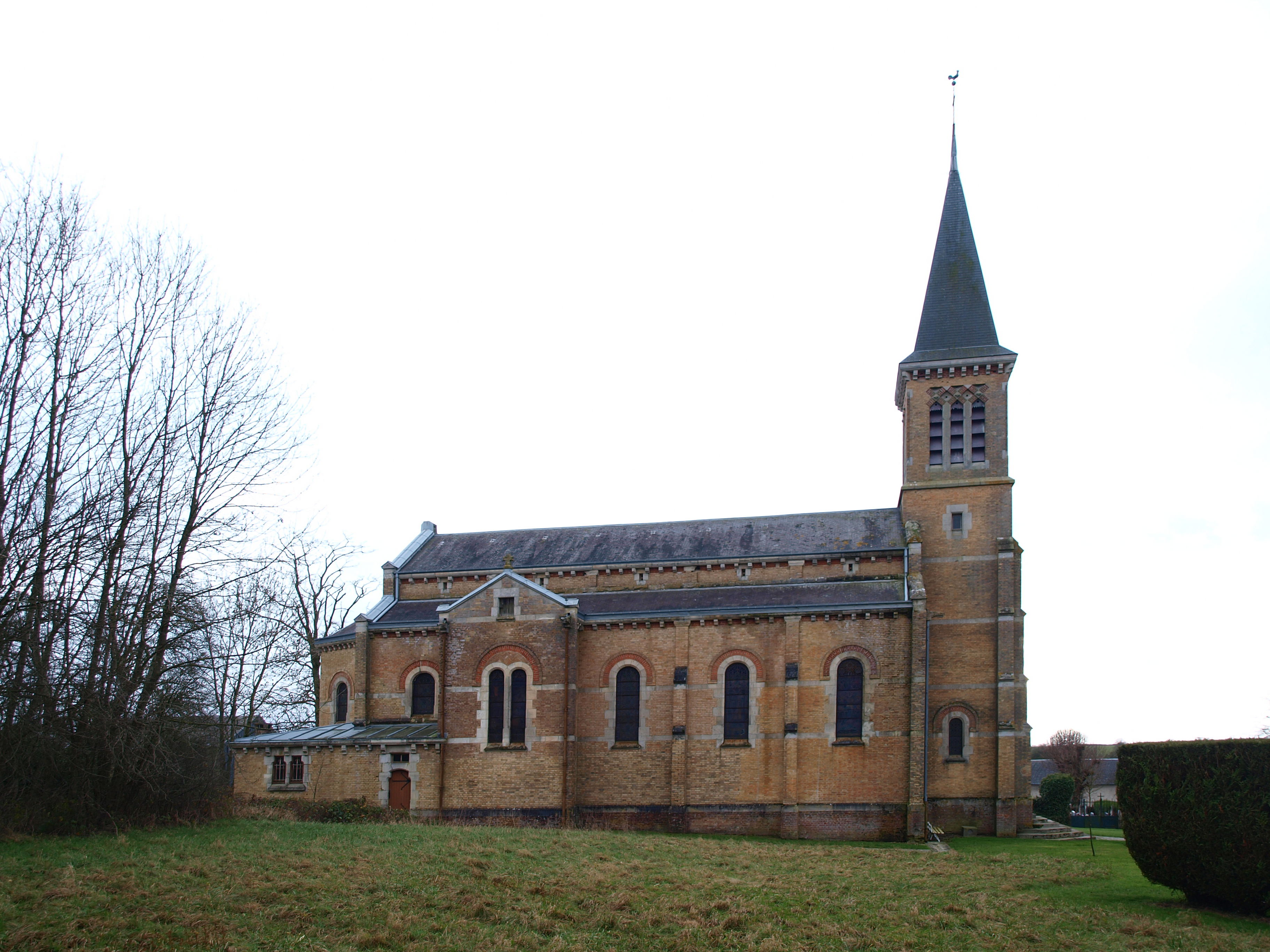 Les Alleux (Ardennes, France) ; église Saint-Jean-Baptiste.